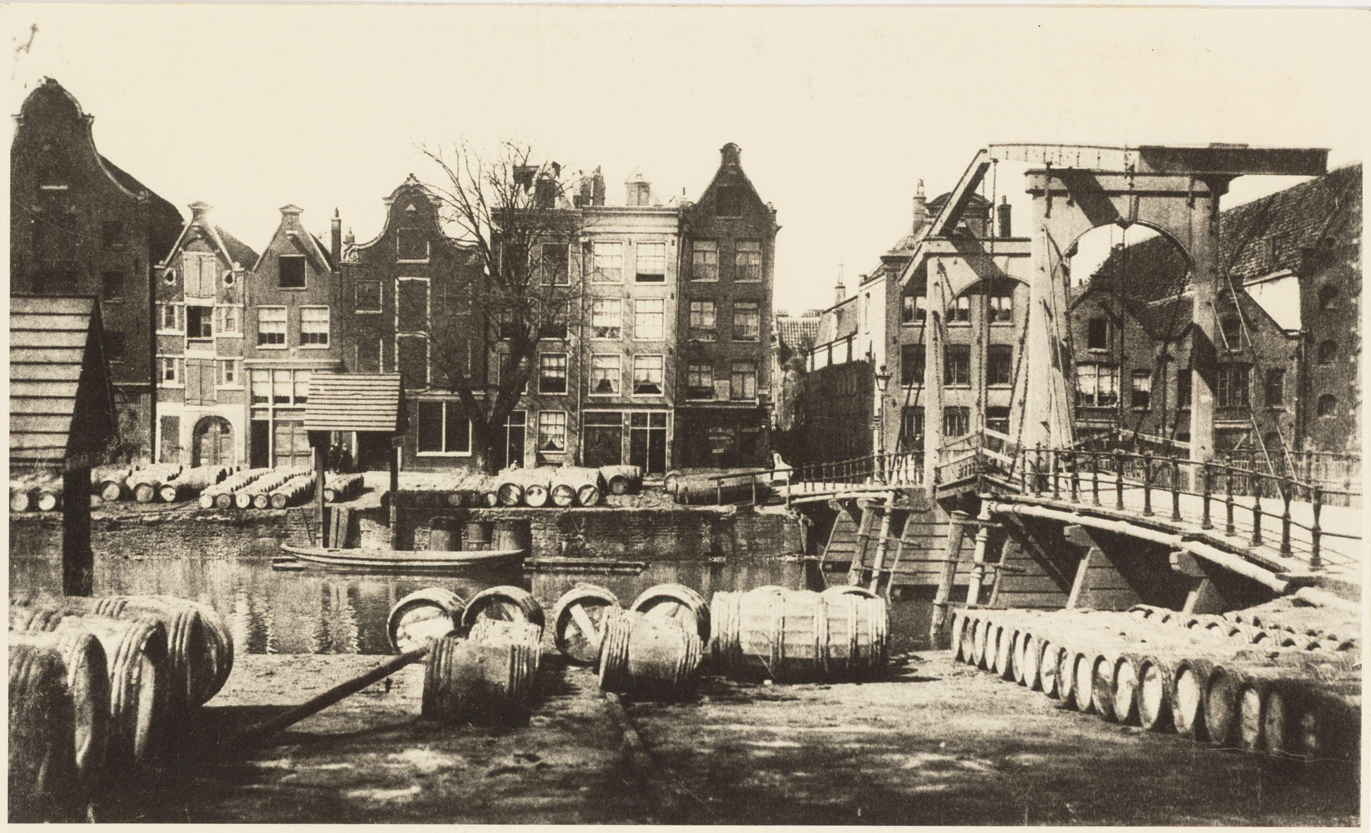 Beschrijving Nieuwe Teertuinen 18 (ged.)-26 (ged.) (v.r.n.l.), gezien in westelijke richting Rechts de Sloterdijkerbrug (Brug 321) vóór de ingang van de Sloterdijkstraat. Links twee windassen voor het ophijsen van teertonnen uit de schuiten in de gracht. Op de wal teeropslag in tonnen. Documenttype foto Vervaardiger Onbekend Anoniem Collectie Archief van het Bureau Monumentenzorg: glasnegatieven en negatiefloze foto's Datering 1940 ca. Geografische naam Sloterdijkstraat Nieuwe Teertuinen Inventarissen Afbeeldingsbestand 012000004955